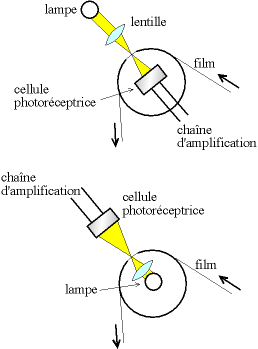 Principe du lecteurs de son optique au cinéma